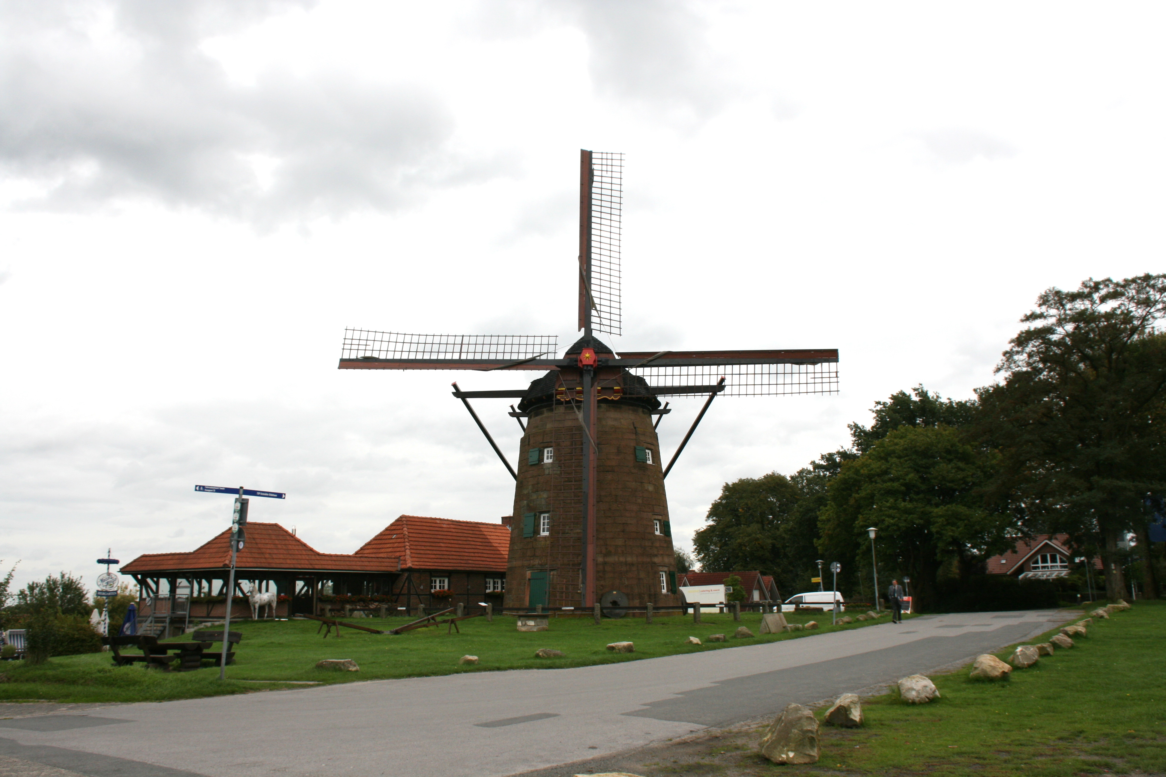 Ostmühle, Mühlenberg in Gildehaus Bad Bentheim